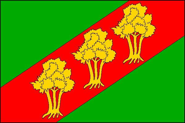 Vlajka obce Brumov